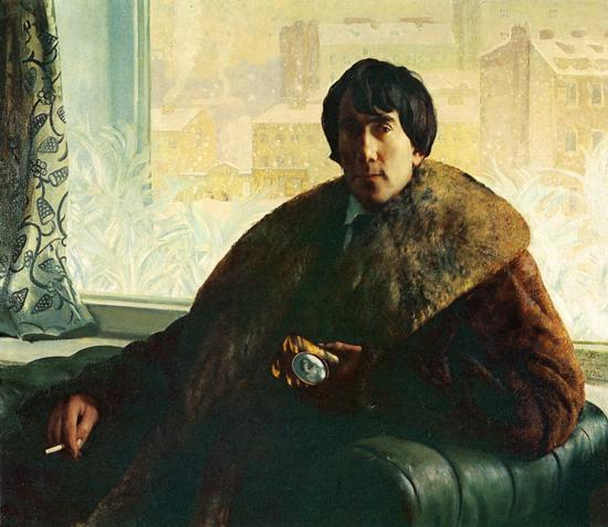 Б.М. Кустодиев. Портрет Исидора Самойловича Золотаревского, архитектора и скульптора, 1922г.